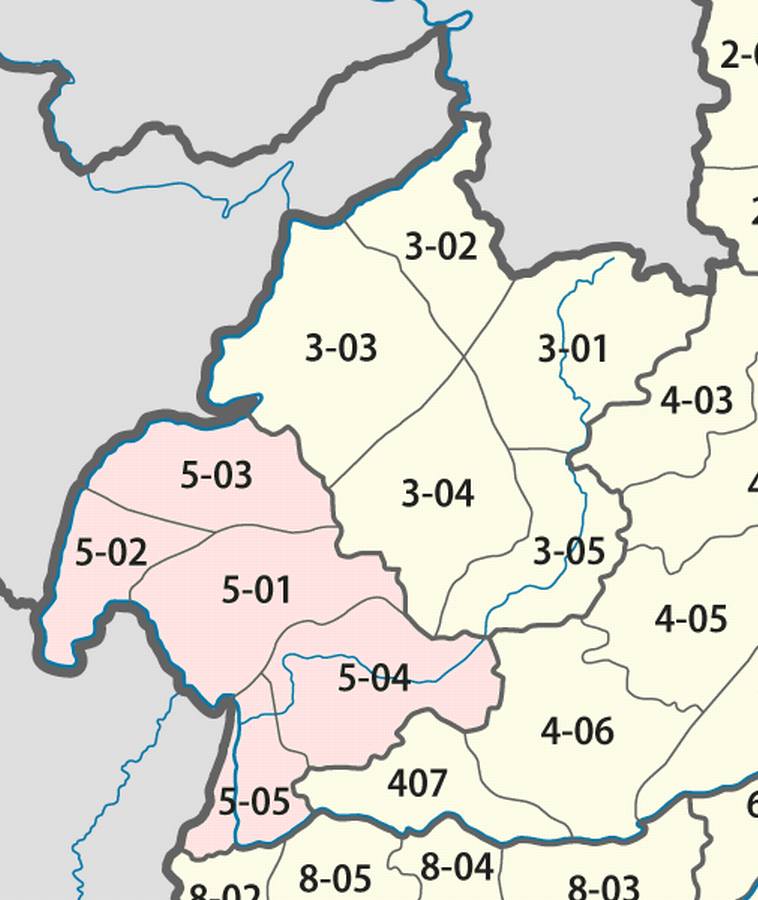 Giấy phép